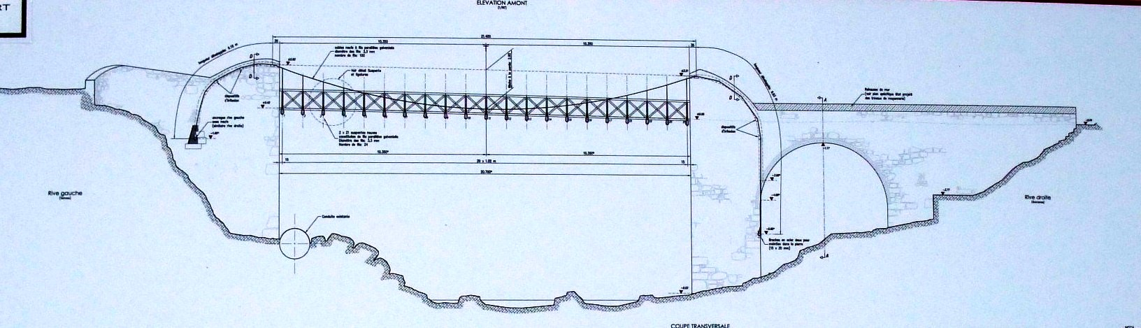 Pont de Moulin sur Cance schéma